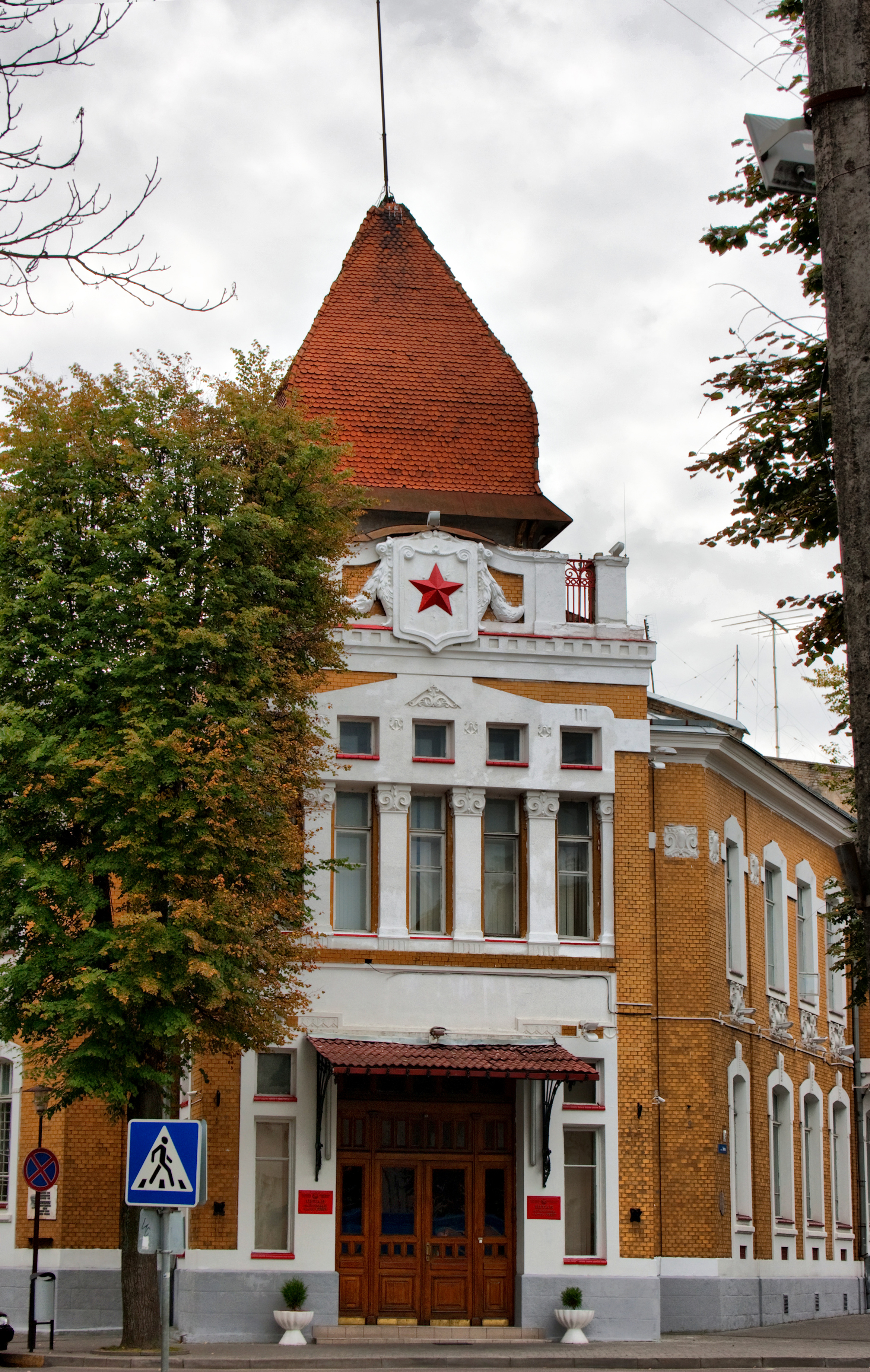 Беларуская (тарашкевіца): Будынак былога пазямельнага банка(архітэктар Б.П. Астравумаў). г. Горадня This is a photo of Belarusian heritage monument. Reference number: 412Г000656 ( WLM)